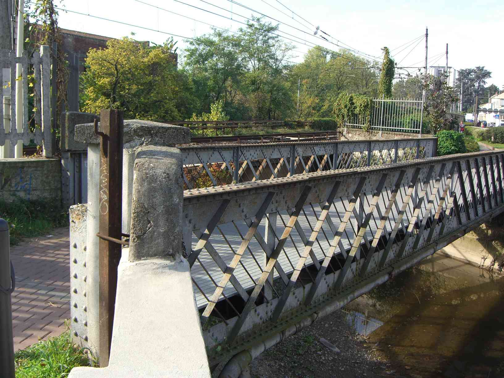 MB Monza ponte pedonale e ponte ferroviario sul Lambretto in via Azzone Visconti